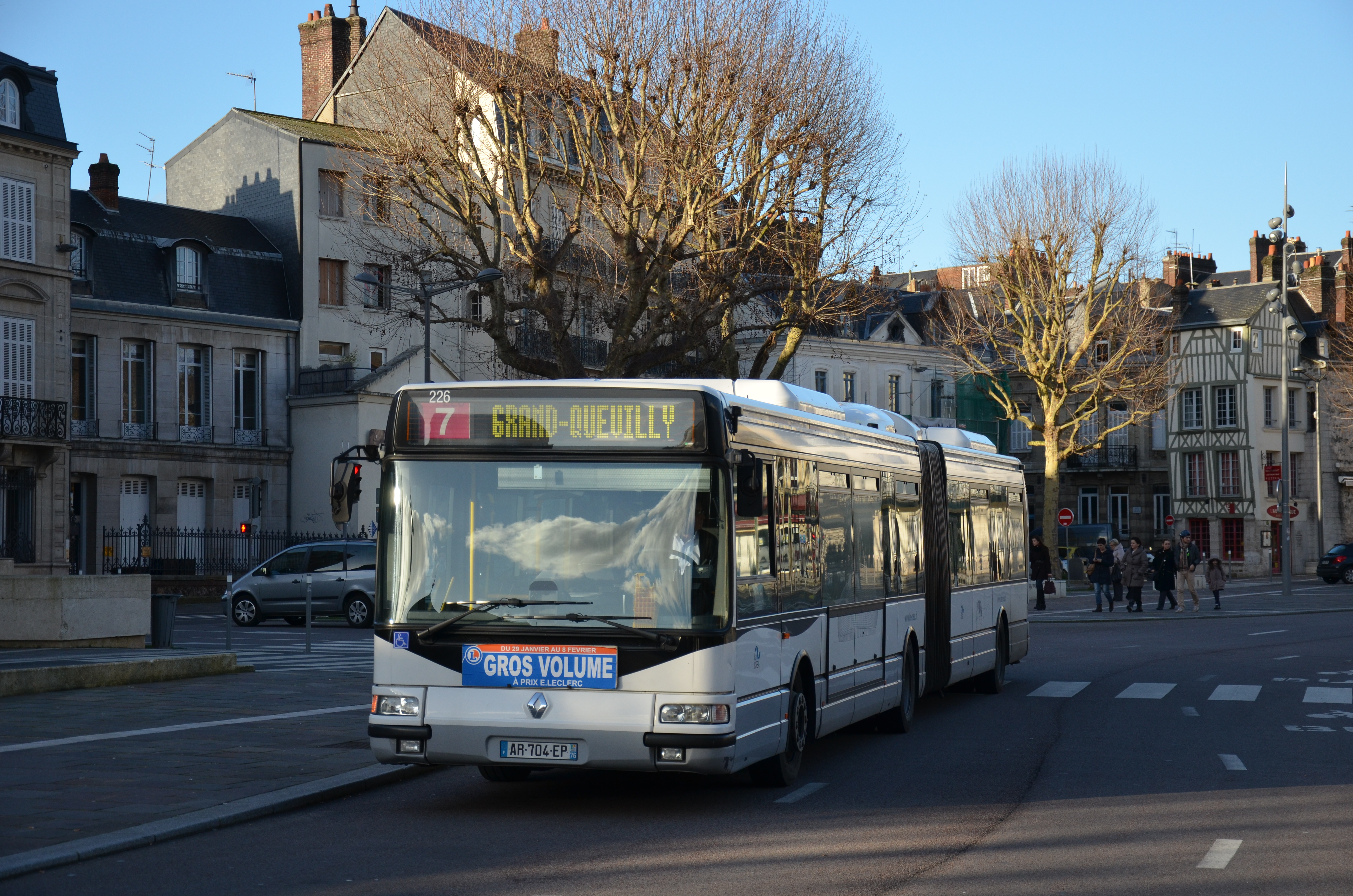 Irisbus Agora L n°226 arrivant à l'arrêt Hôtel de Ville, sur le réseau ASTUCE de Rouen sur la ligne 7.